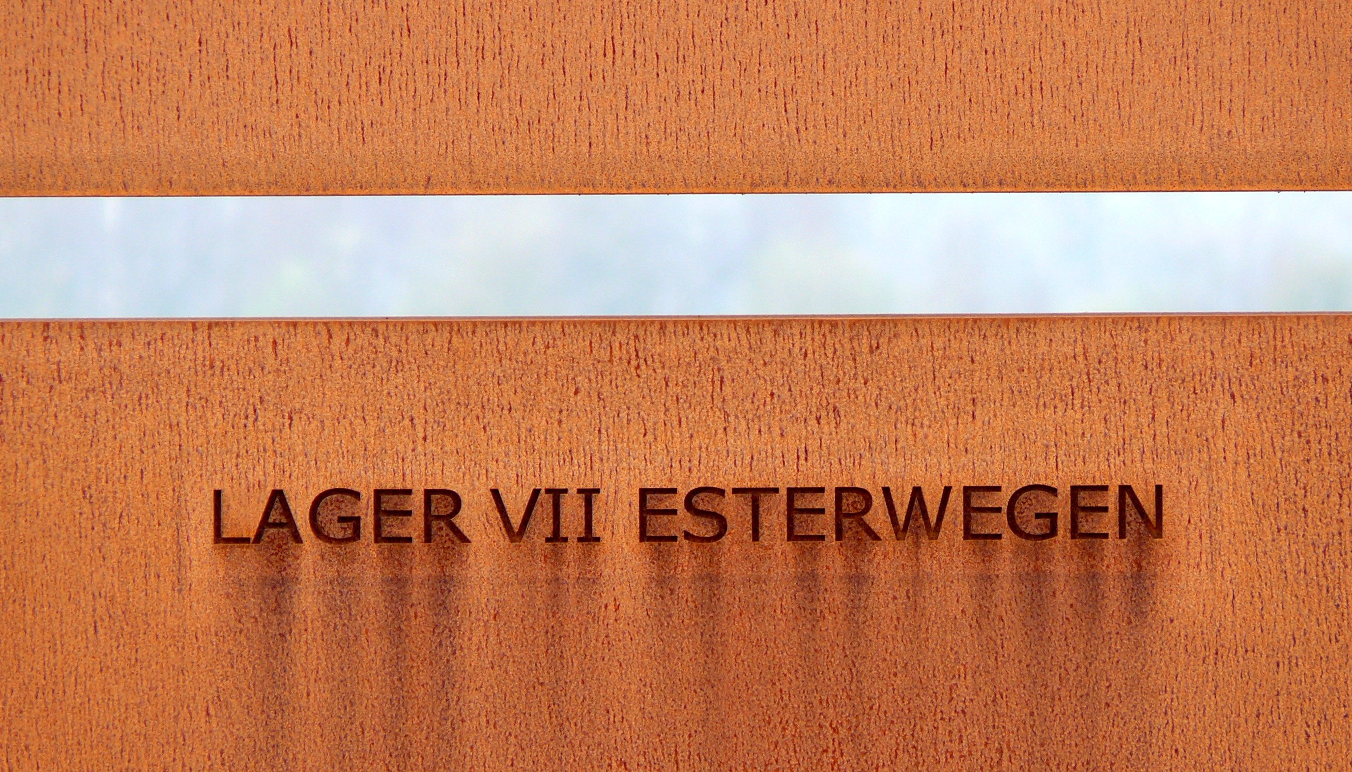 Namenwand am Ende der Lagerstraße in der Gedenkstätte Esterwegen, Lager VII